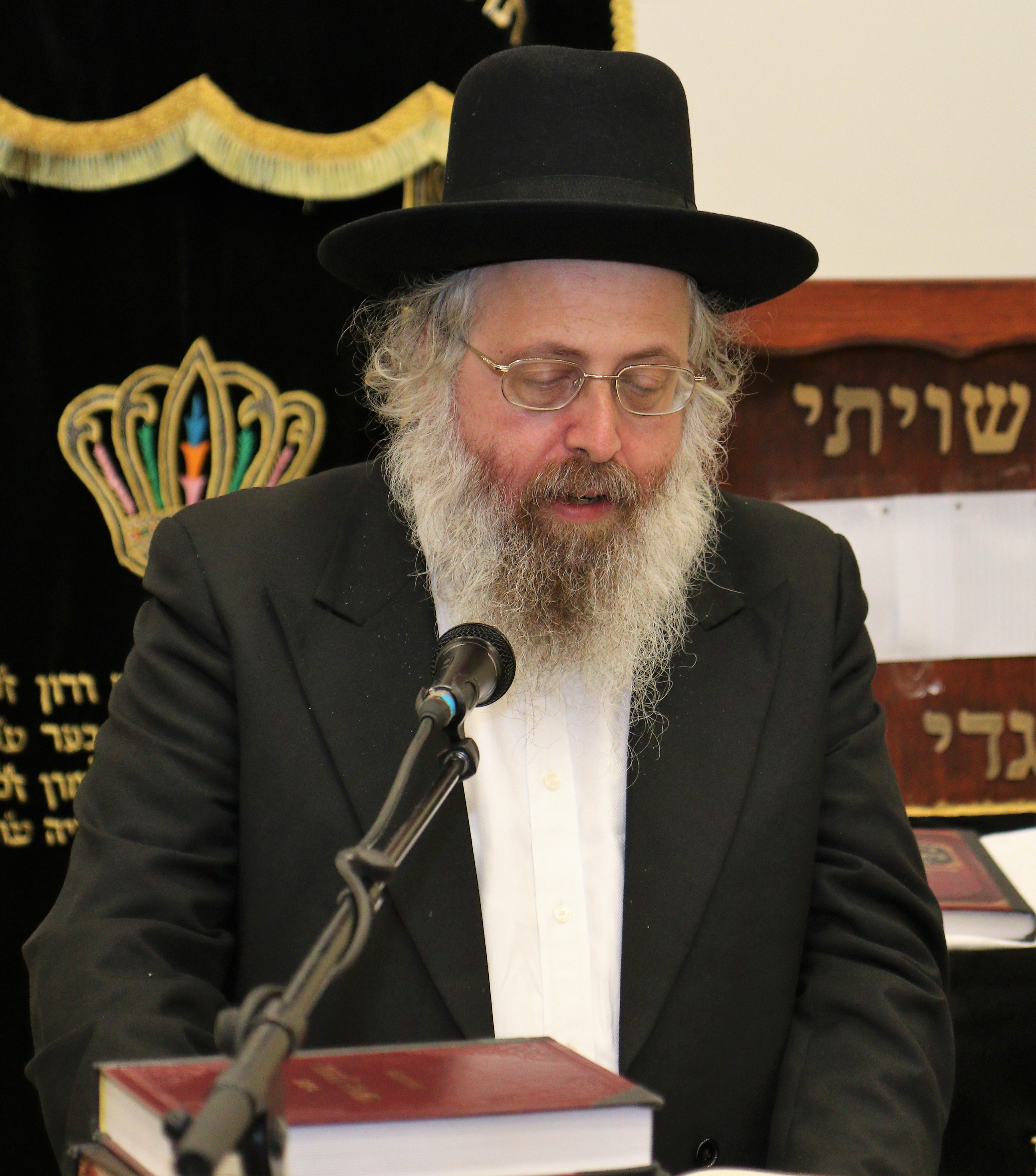 הרב מנחם מנדל לובין. אוקטובר 2019.